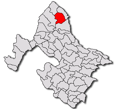 Categorie:Hărţi ale judeţului Mehedinţi